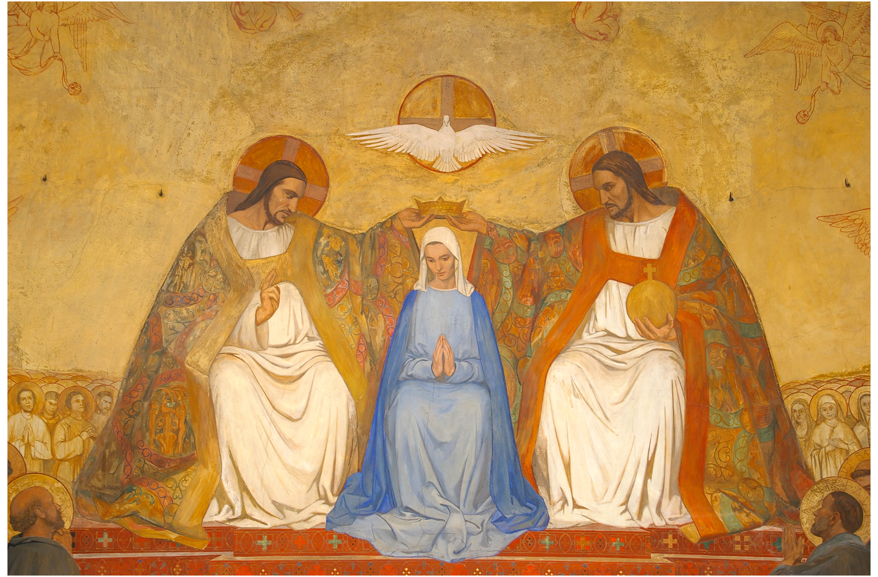 Photo de Bernard FORIEN pour le livre Notre Dame du Calvaire